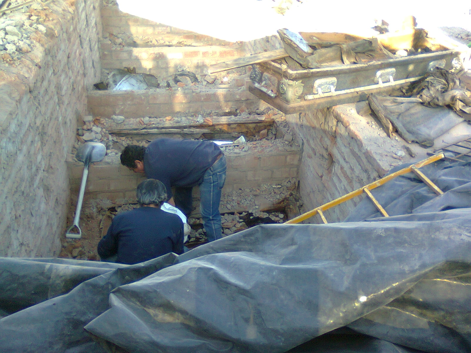 Dos trabajadores del Cementerio Católico de Maipú exhumando los cuerpos sepultados en los nichos dañados por el terremoto del 27 de febrero de 2010 para trasladarlos de lugar. Maipú, Santiago de Chile, 16 de mayo de 2011.